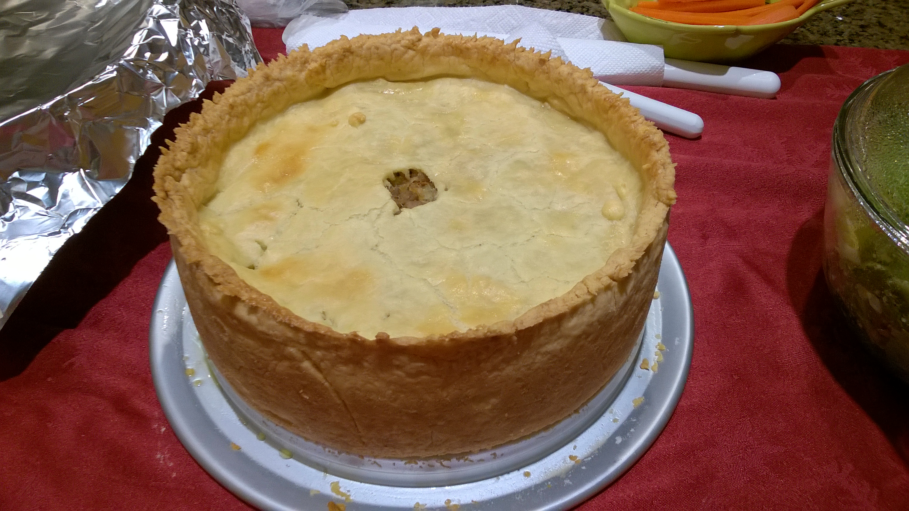 Tourtière préparée dans l'Alberta (Canada)